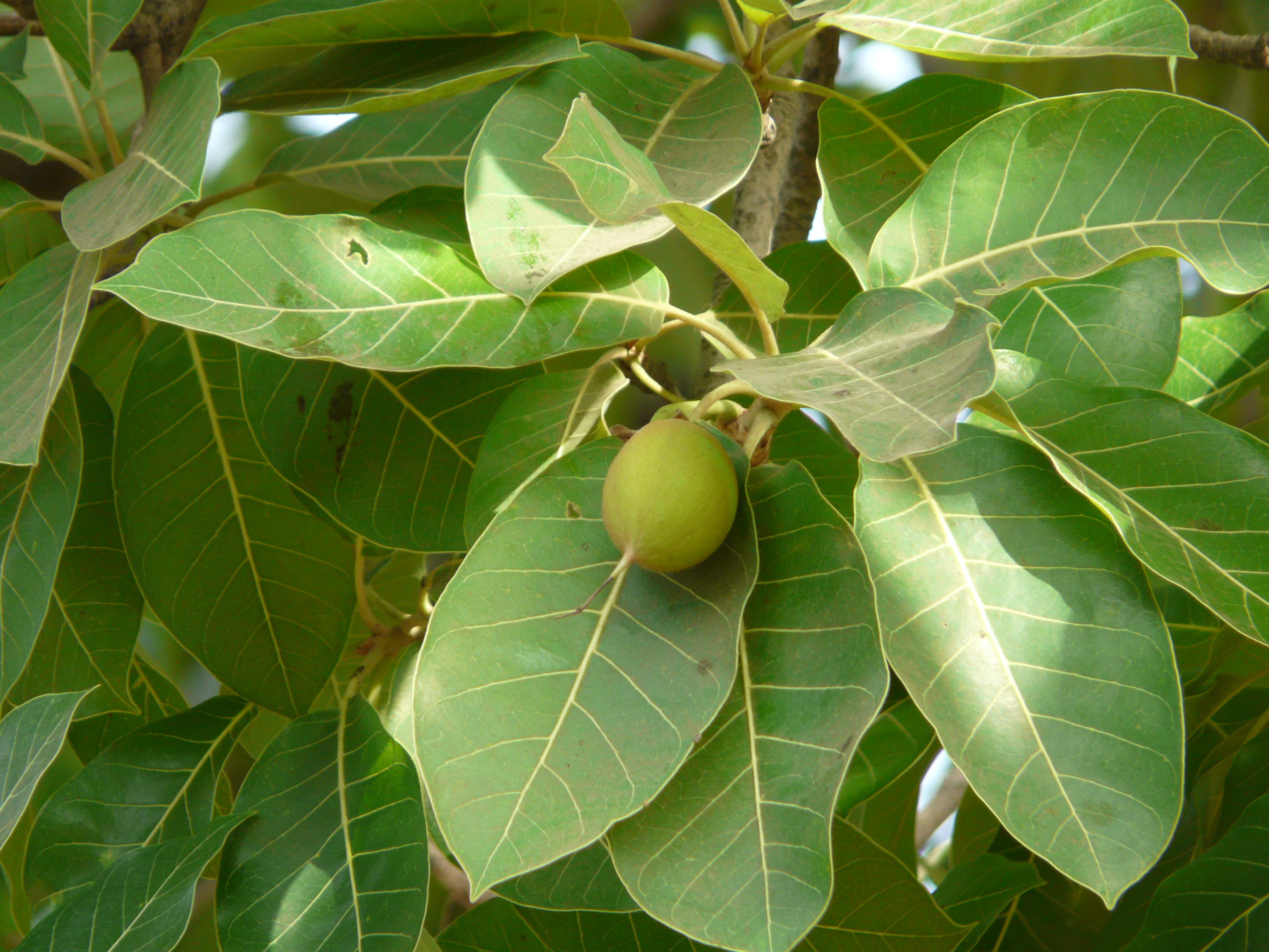 Sapotaceae (sapota family) » Madhuca longifolia var. latifolia MAH-dhuk-ah -- from Sankrit name of the plant, madhuka lon-jee-FOH-lee-uh -- meaning, long leaves lat-ee-FOH-lee-uh or lat-ih-FOH-lee-uh -- meaning, wide leaves commonly known as: honey tree, Indian Butter Tree, mahua • Assamese: মহুবা mahua • Bengali: মহুয়া mahuya • Gujarati: મહુડો mahudo • Hindi: गिलौंदा gilaunda, गुलू gulu, गुड़ gur, महुआ mahua, वानप्रस्थ vanprasth • Kannada: ಇಪ್ಪೆ ippe • Kashmiri: महोरा mahora, महवा मोवा mahwa-mova • Konkani: मोहवा mohwa • Malayalam: ഇലിപ്പ ilippa • Marathi: म्होंव mhomva, मोह or मोहा moha • Nepalese: मौवा mauwa, महुवा mahuwa • Pali: मधुकम madhukam • Prakrit: महुअं mahuam, महुओ mahuo • Sanskrit: मधूक madhuca, मधूकम् madhucam, मोह moha, वानप्रस्थः vānaprasthh • Tamil: காட்டிருப்பை kattiruppai, இலுப்பை illupei • Telugu: ఇప్ప ippa, మధూకము or మధుకము madhukamu • Urdu: گلوندا gilaunda, gul-chikan, گلو gulu, گڙ gur, مہوا mahua Native to: India References: Flowers of India • NPGS / GRIN • Wikipedia • eFlora • DDSA